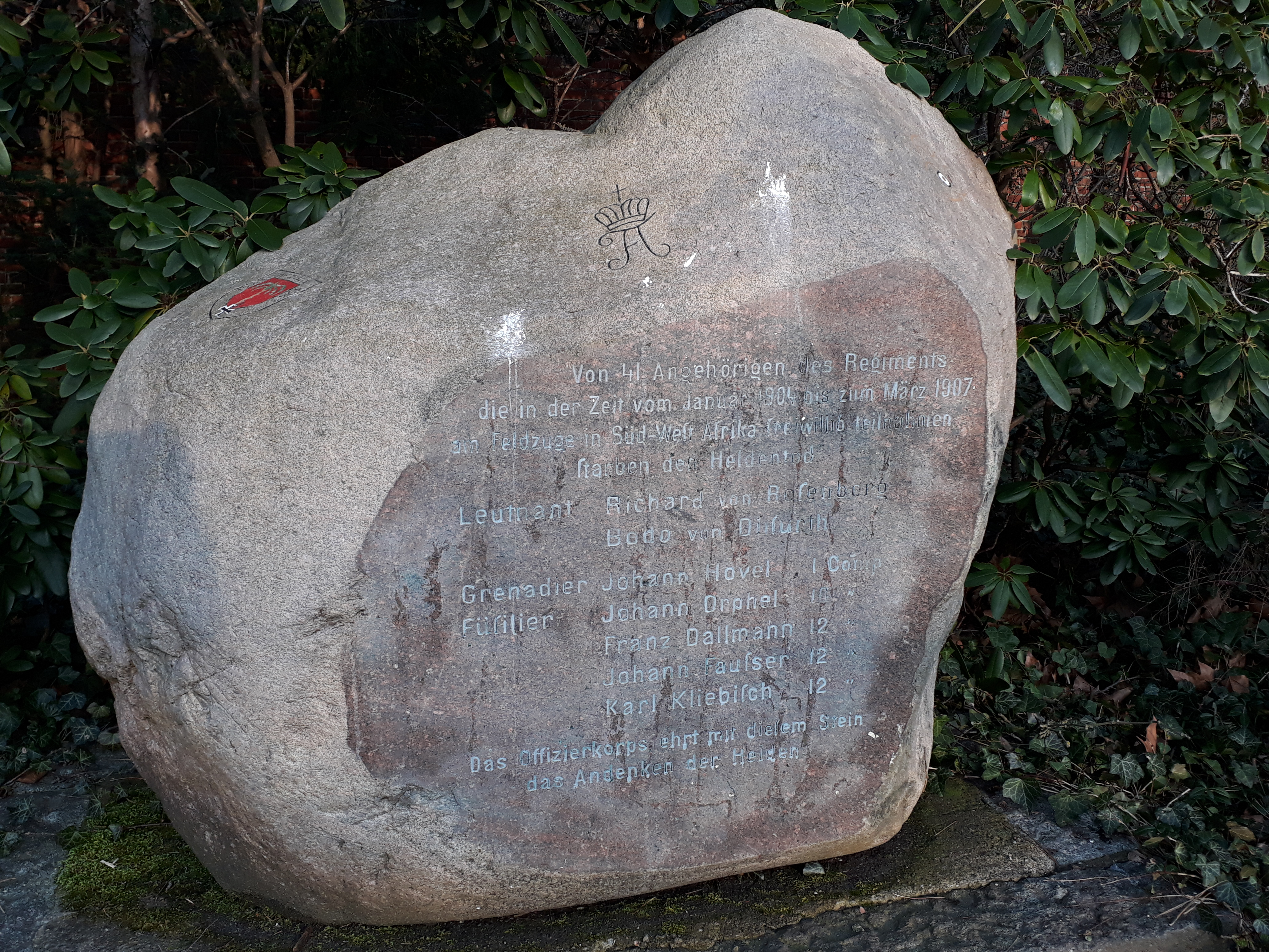 Sogenannter Herero-Stein auf dem Friedhof am Columbiadamm, Berlin